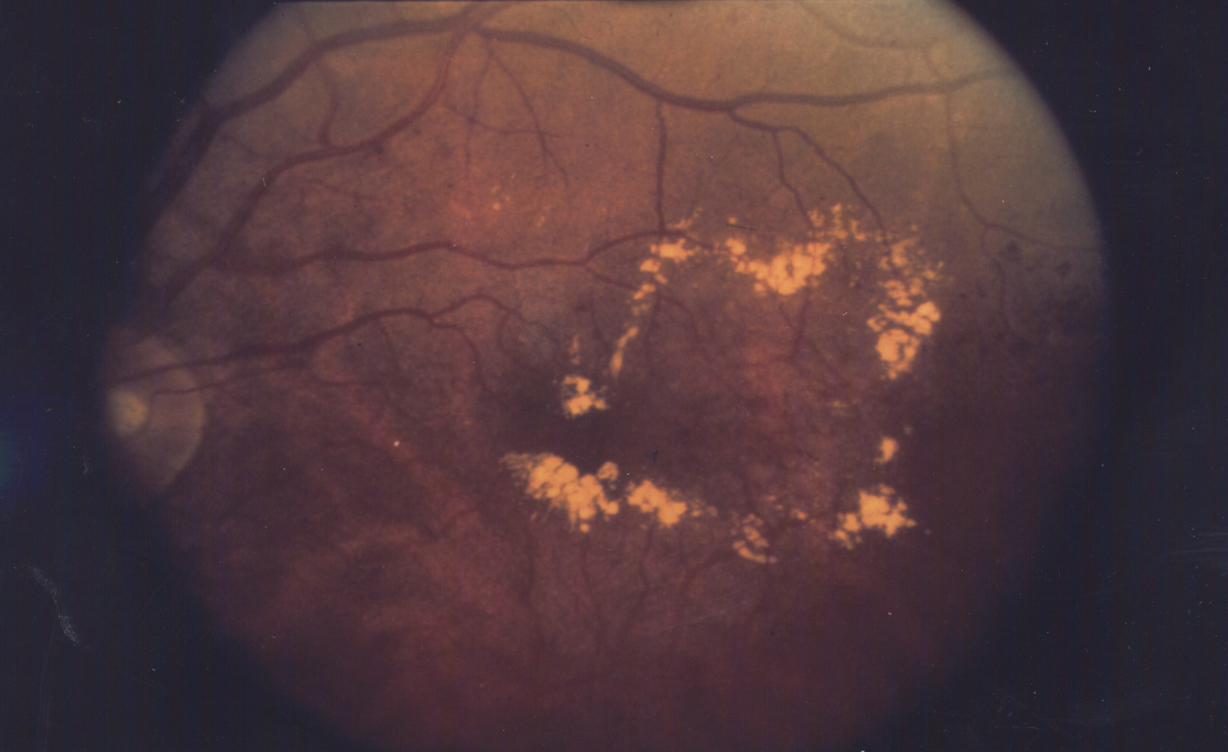 Diabetic macular edema.